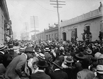 Semana Trágica, abril de 1920